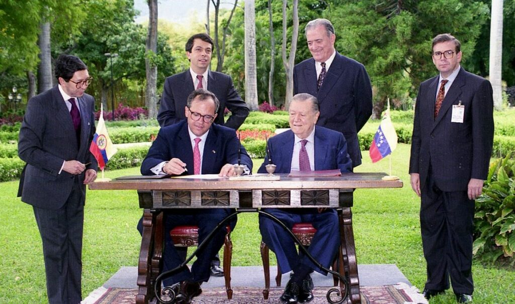 El presidente colombiano Ernesto Samper y el presidente venezolano Rafael Caldera, en los jardines de la residencia presidencial La Casona, Caracas.